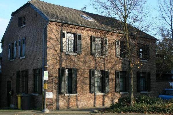 Arsbecker Hof in Wegberg-Arsbeck